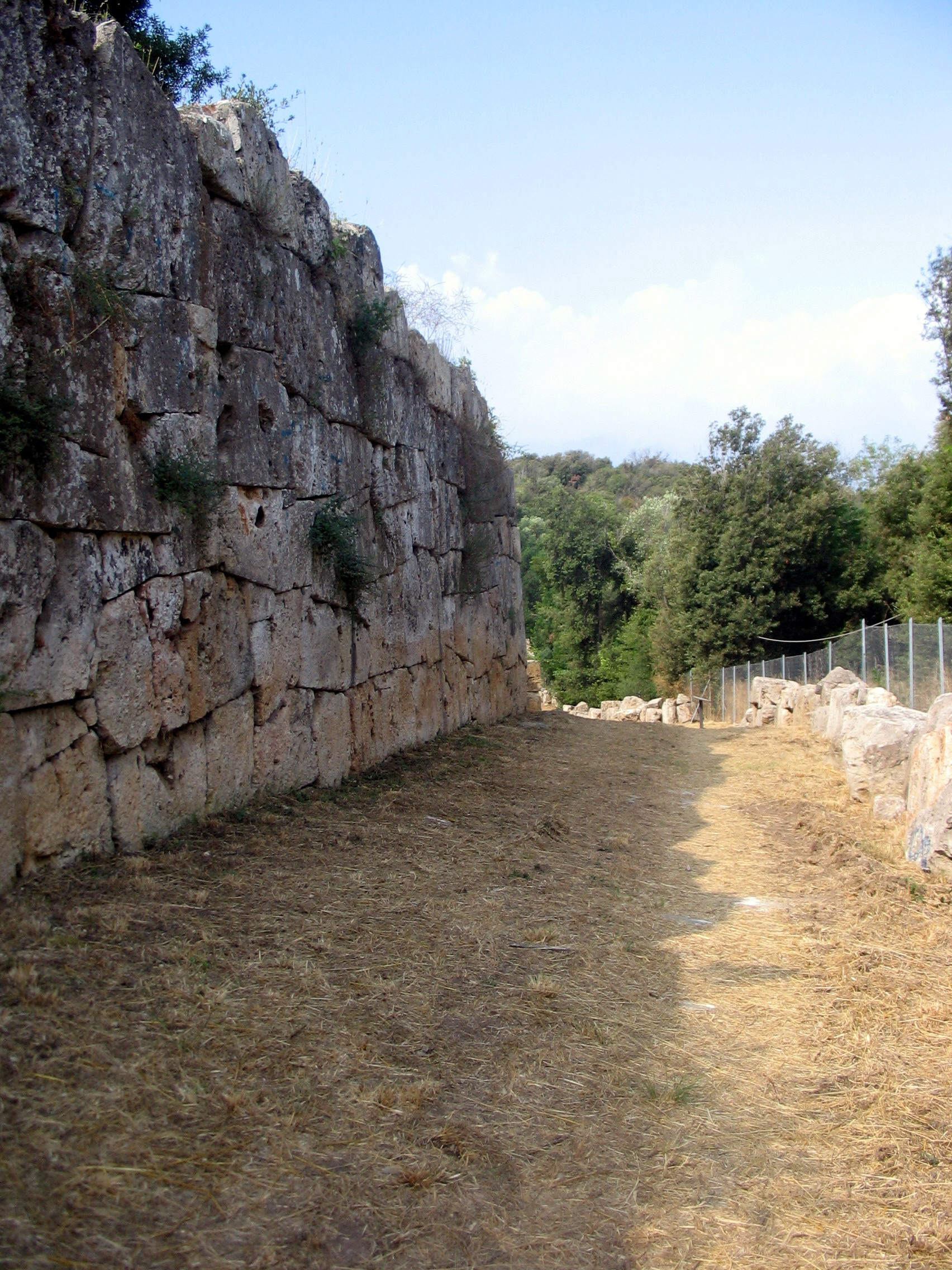 Cosa, Ansedonia, Orbetello, Toscana, Italia